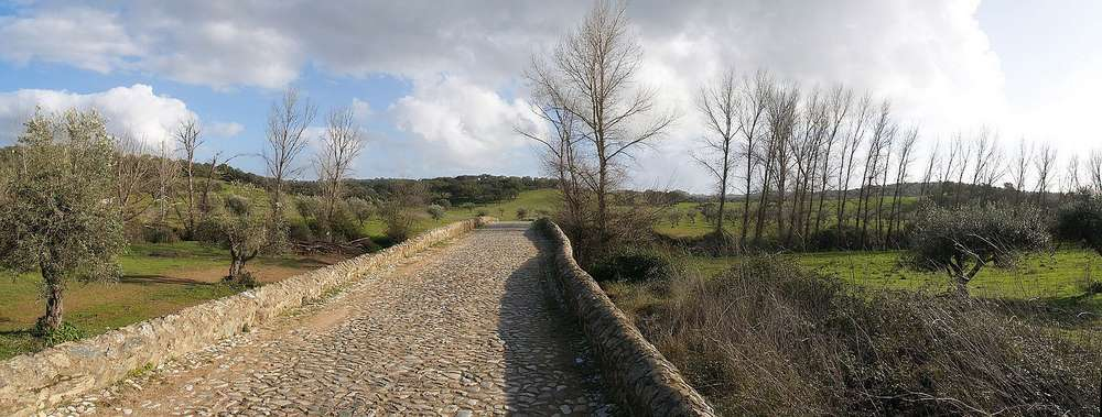 à Vila Ruiva entre Vidigueira et Alvito